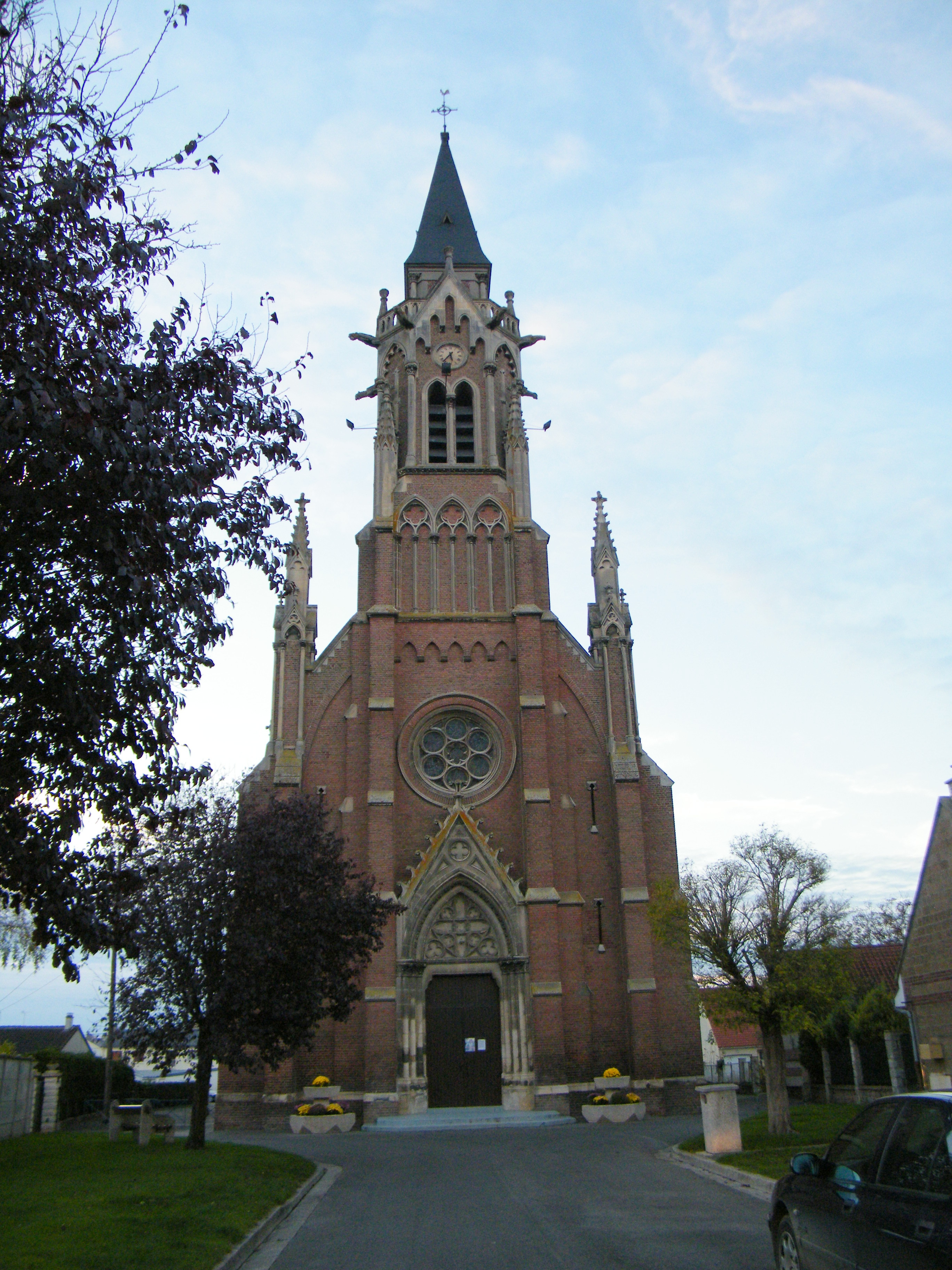 L'église.